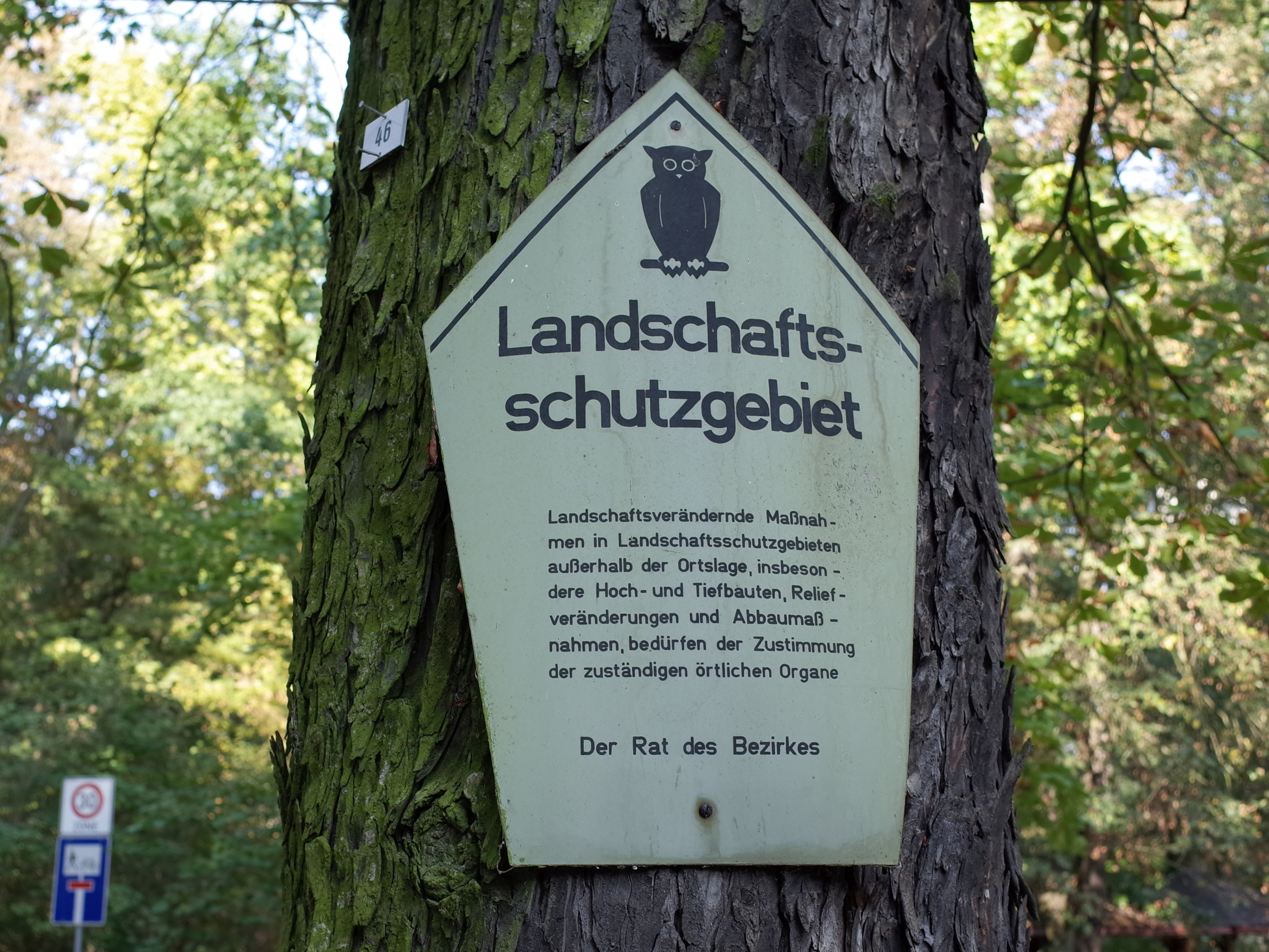 Schild zur Kennzeichnung von Landschaftsschutzgebieten in der DDR.